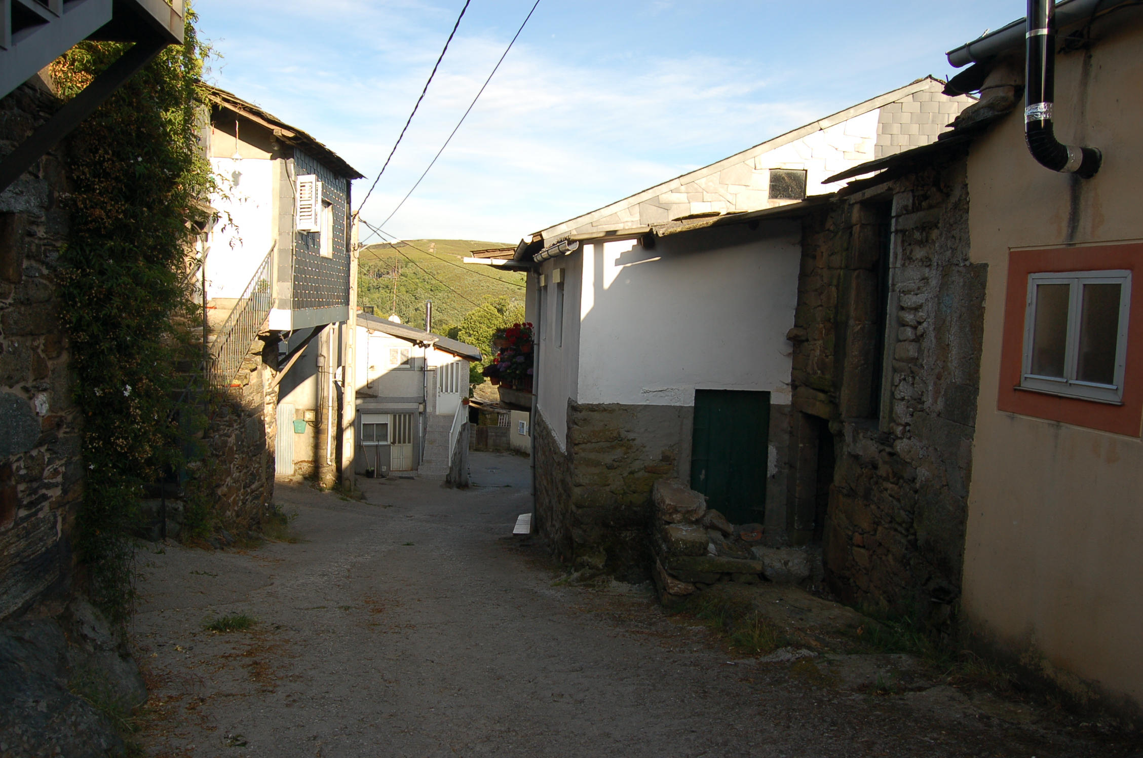 Vista da aldea de Carracedo da Serra